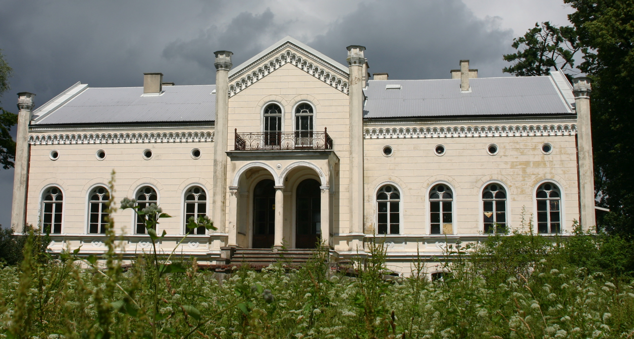 Rodele (deutsch Rodehlen) ist ein Dorf in Polen in der Woiwodschaft Ermland-Masuren. Das Dorf gehört zur Gemeinde Barciany im Powiat Kętrzyński.